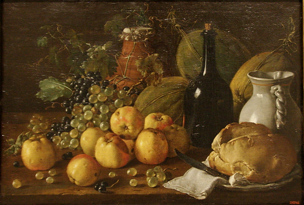 Natura morta amb pomes,raïm, melons, pa,gerra i ampolla, pintura a l'oli de Luis Meléndez conservada al Museu Nacional d'Art de Catalunya Barcelona